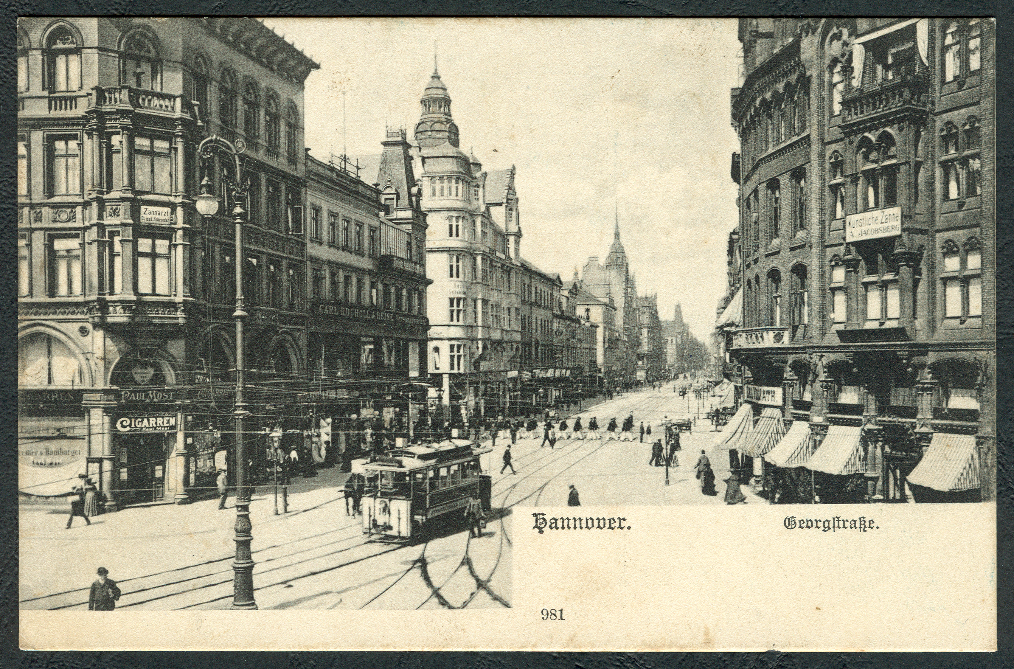 Bildmotiv der Ansichtspostkarte von Karl Friedrich Wunder